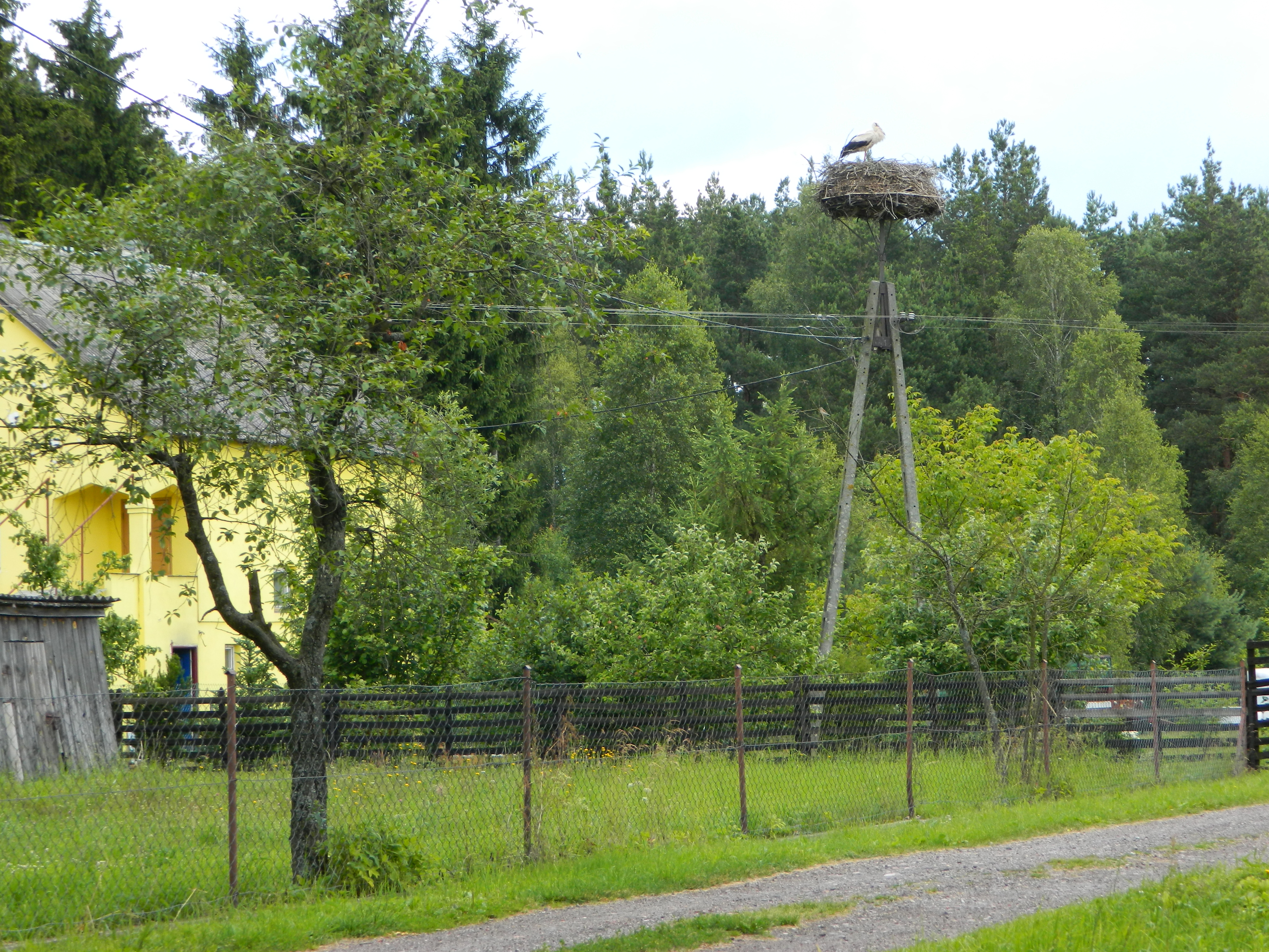 Bocianie gniazdo, Rozogi, Warszawska